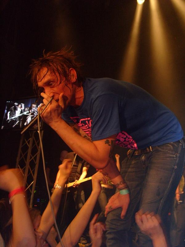 Karel Buriánek ze Sunshine během koncertu (leden 2008).